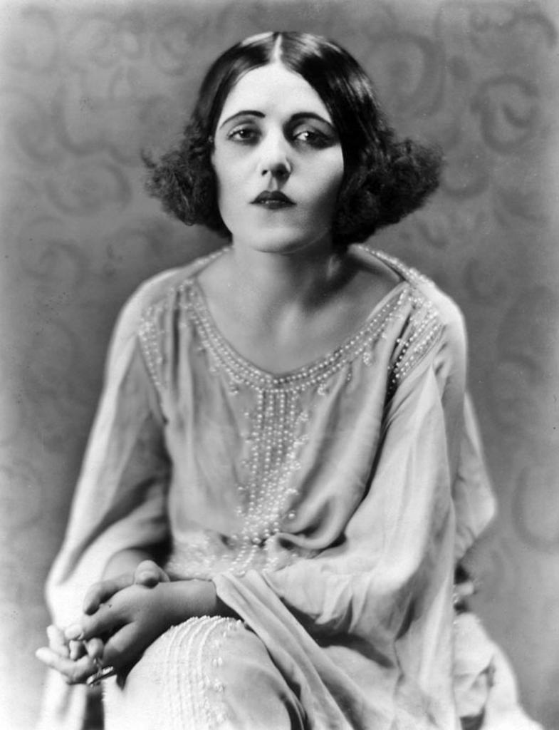 Fotot är ett utav en liten serie som togs i samband med Rozalija Sršens resa I Europa, som kom att bli stilbildare inom mode.